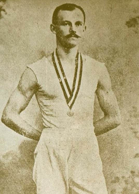 Kéméndy Ernő az UTE első magyar atléta bajnoka, egy ideig főtitkára, labdarúgó bíró, sakkozó.